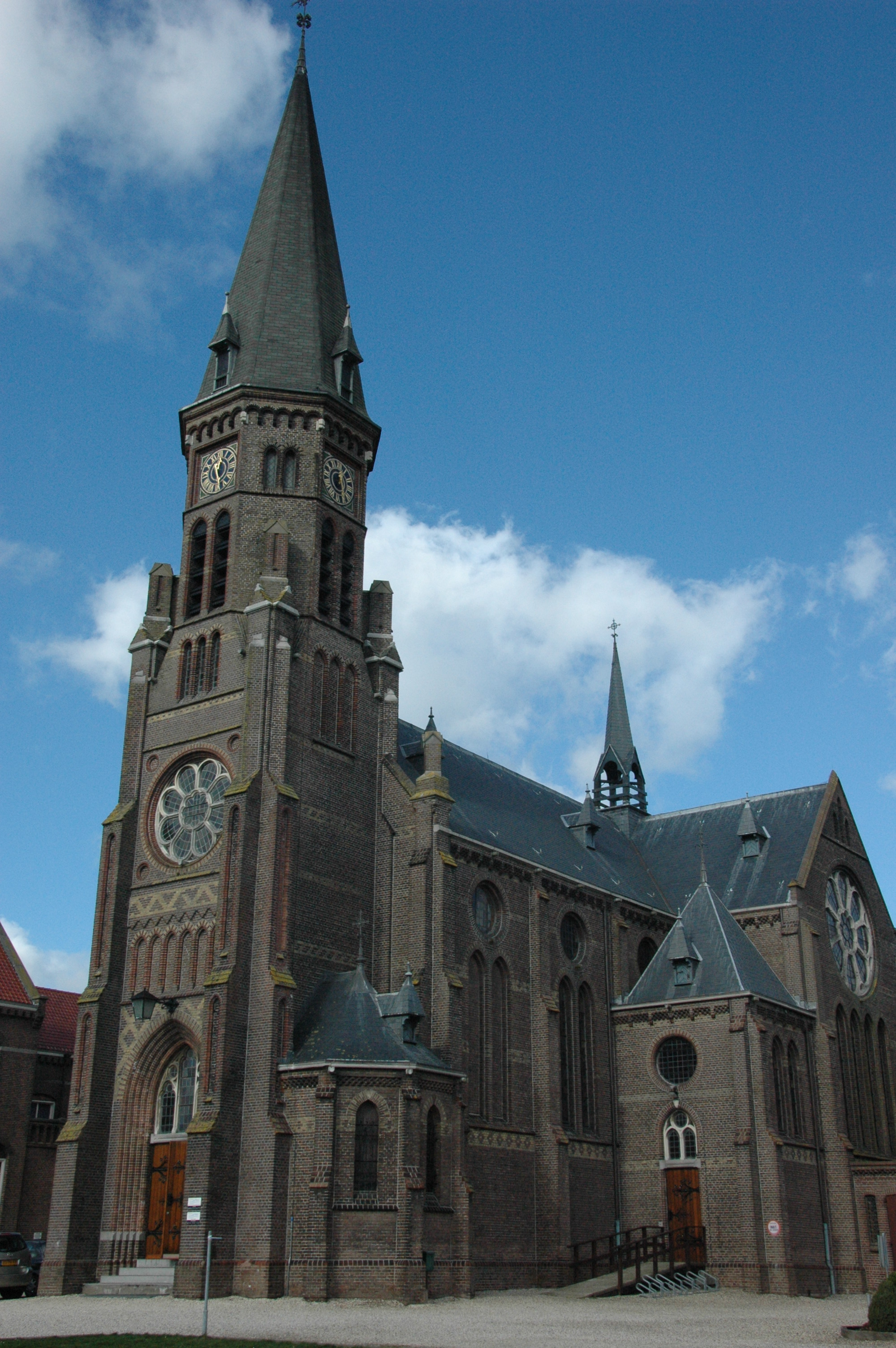 Rooms Katholieke kerk te Reeuwijk-Dorp